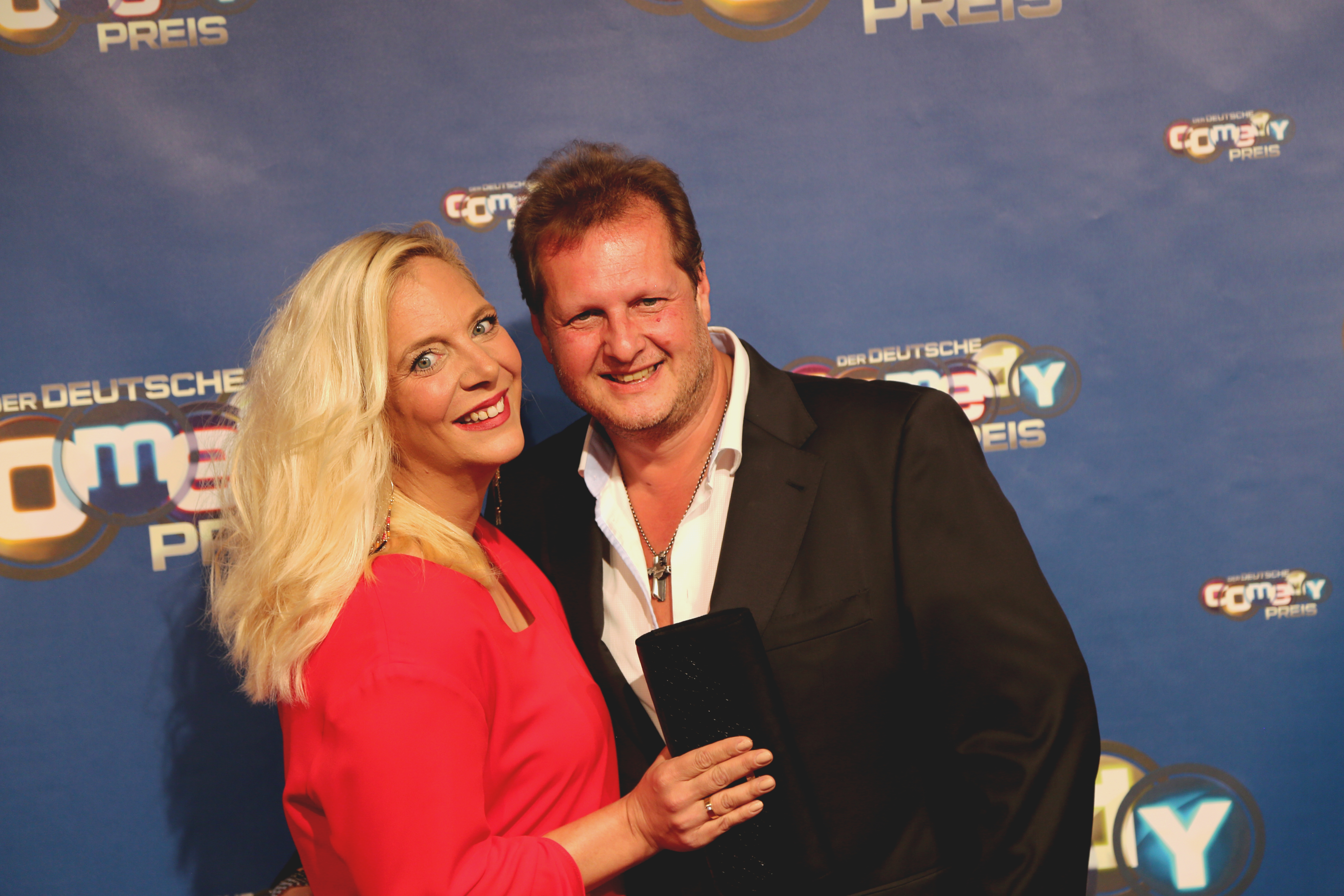 Jens Büchner mit seiner Frau Dani beim Deutschen Comedypreis 2017.